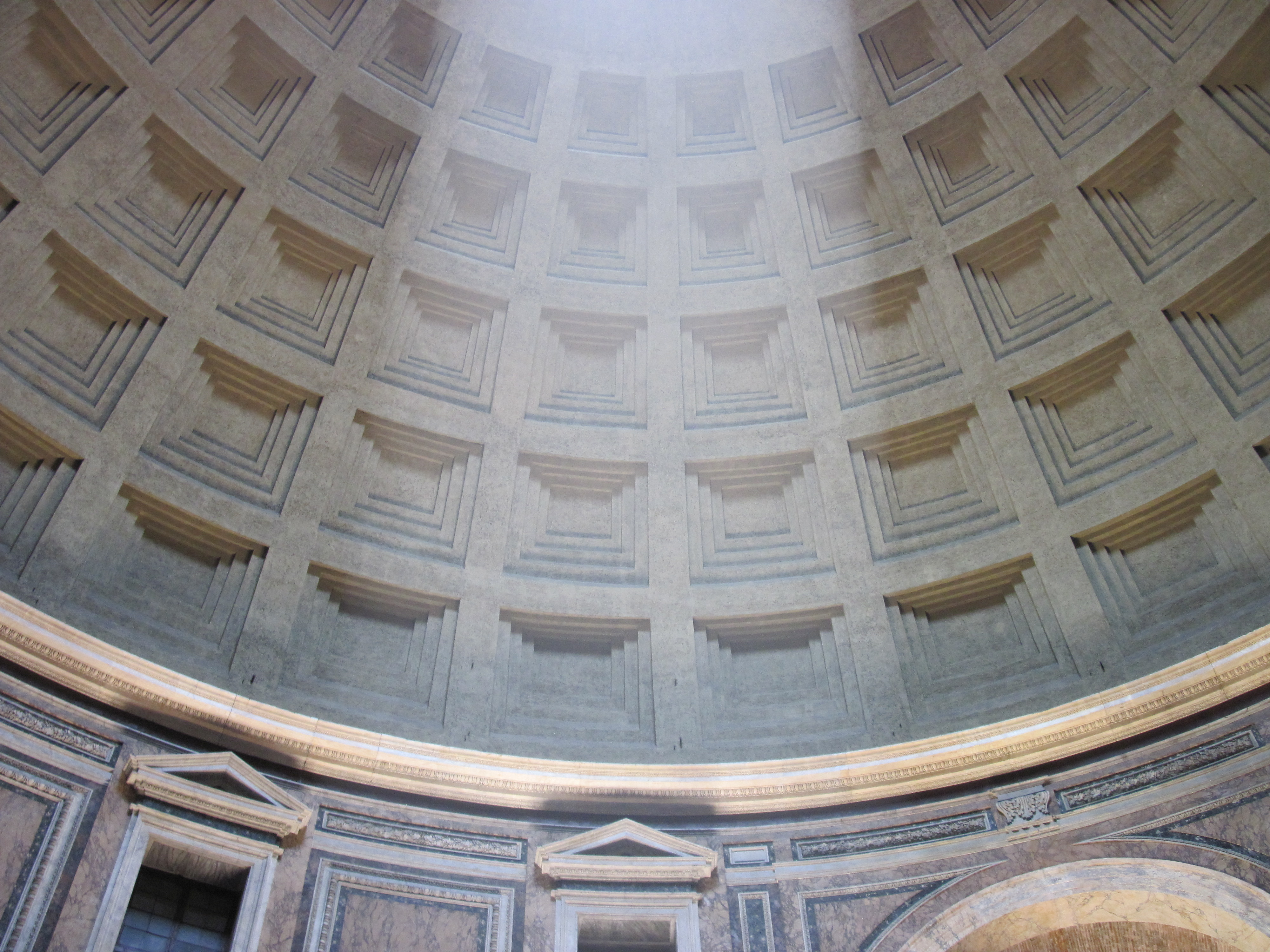 Луч света в Пантеоне